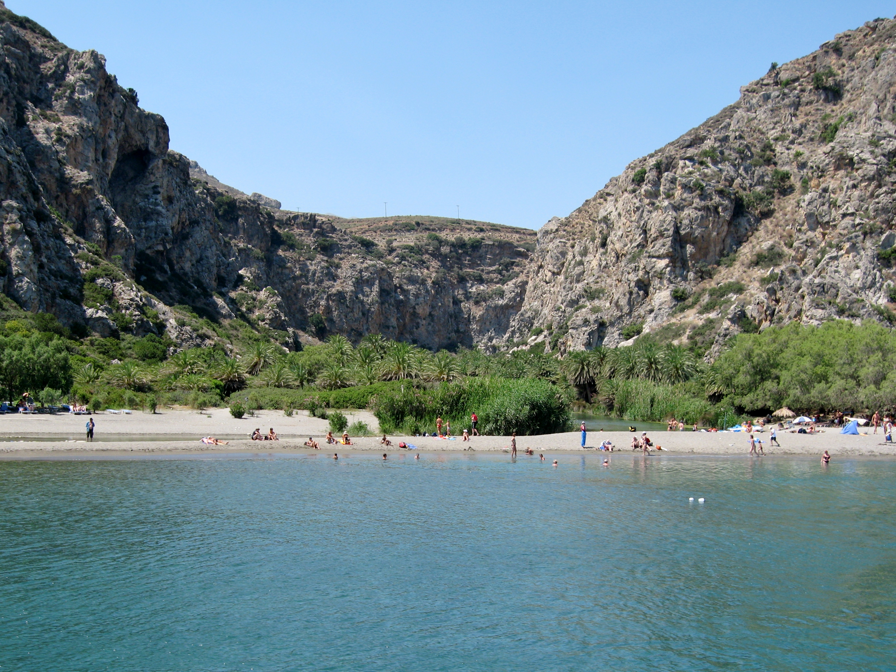 Palmenstrand von Preveli an der Mündung des Megalopotamos, Gemeinde Agios Vasilios, Regionalbezirk Rethymno, Kreta, Griechenland